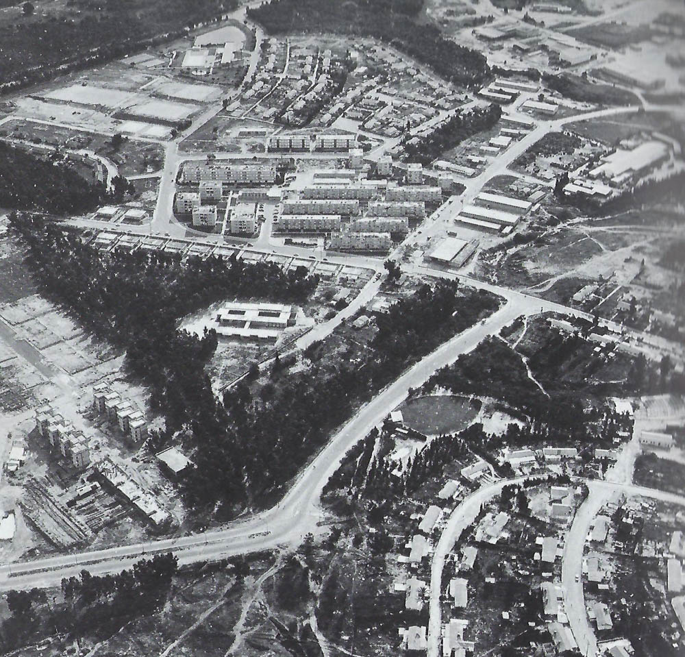 הבנייה של משפחת שקד בשדרות בשנות החמישים של המאה העשרים בתצלום מהאוויר